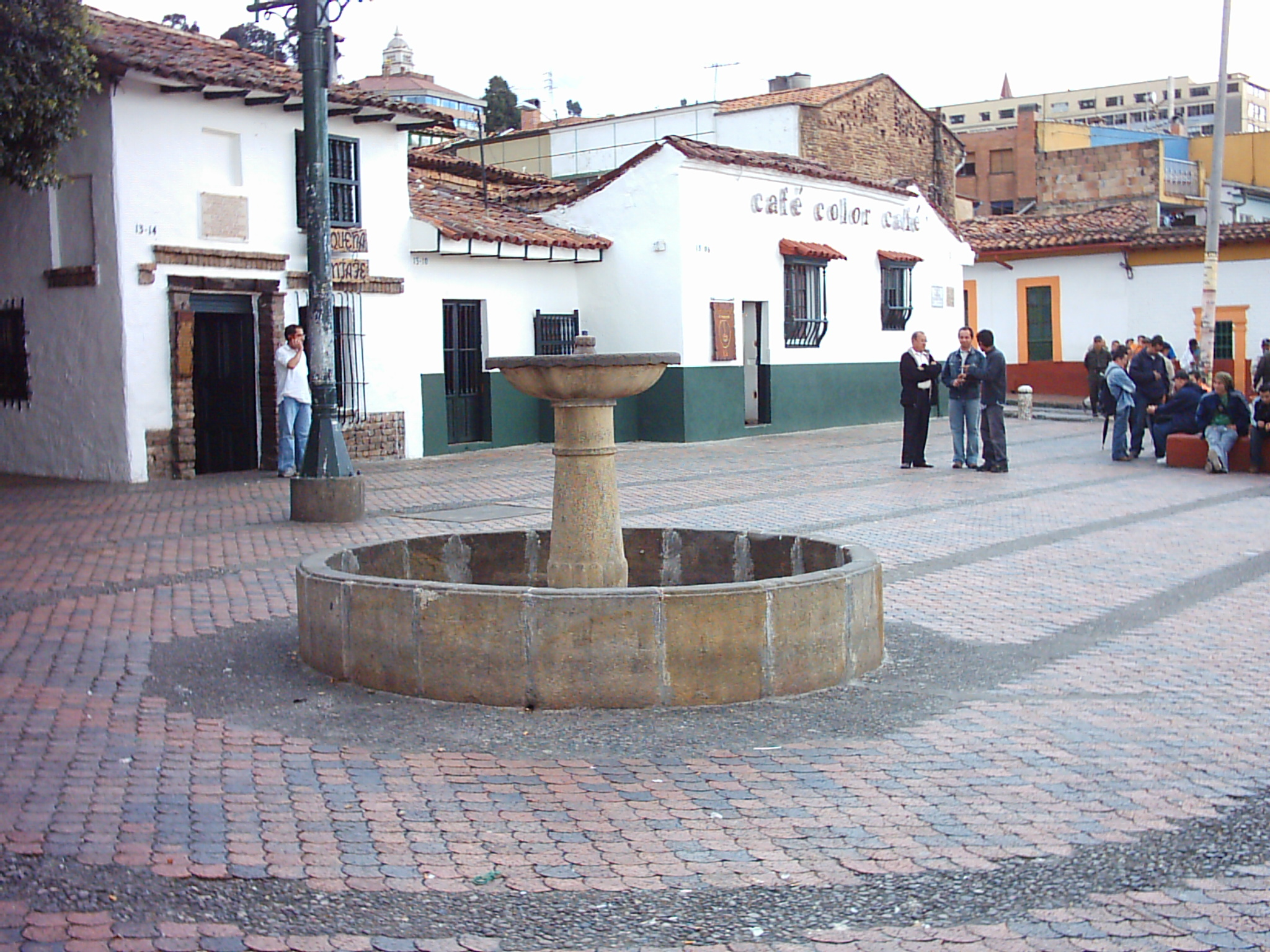 Chorro de Quevedo en Bogotá